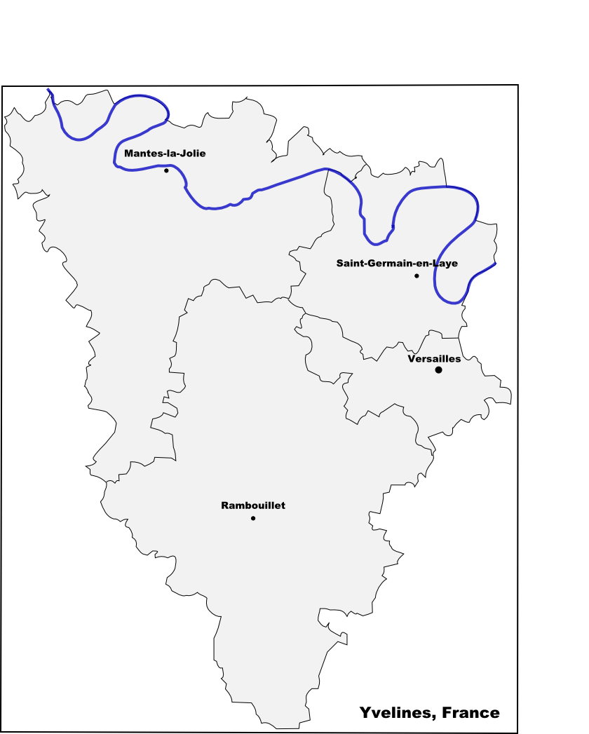 Carte presque vierge du département des Yvelines en France, avec les limites des arrondissements